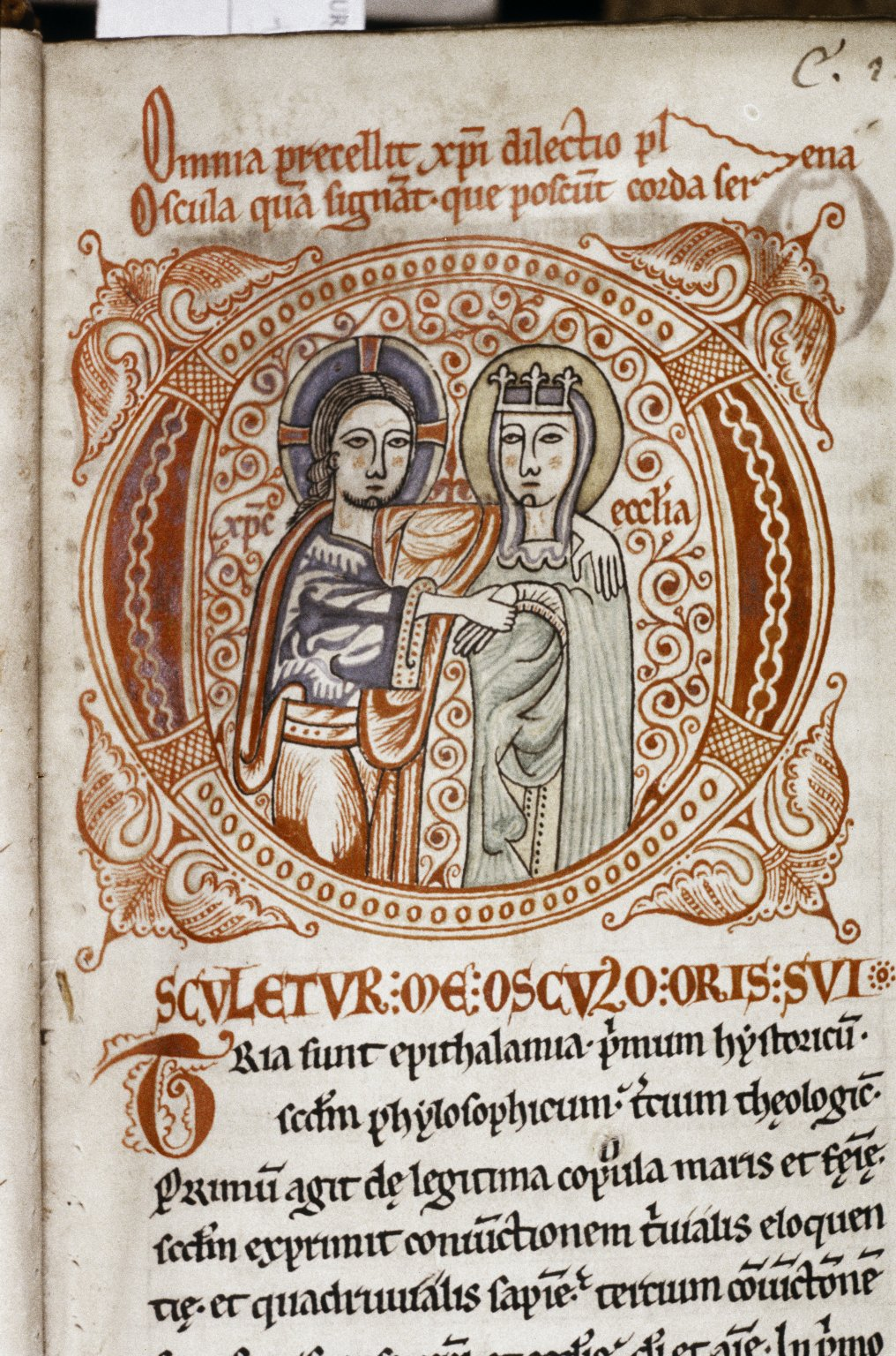 Buchmalerei aus dem Kloster Eberbach, Rheingau. Das vom Mönch Thomas gemalte Bild zeigt "Christus und Ecclesia" und ziert einen Kommentar zum Hohenlied.